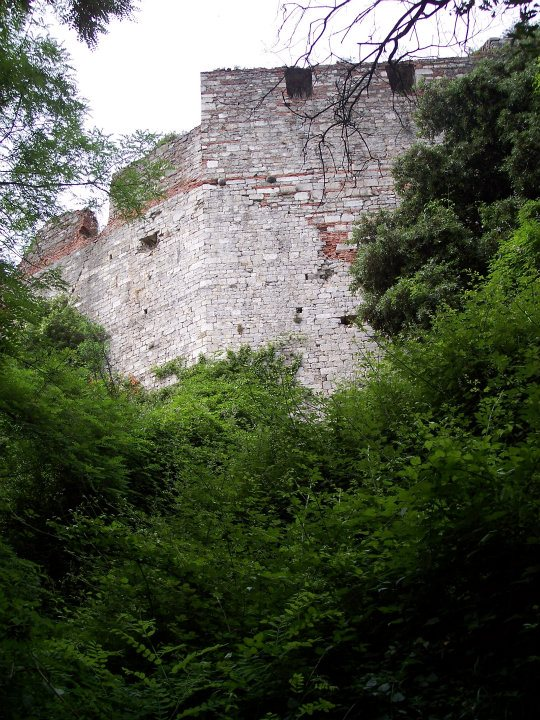 Rocca di Ripafratta - particolare del versante pisano